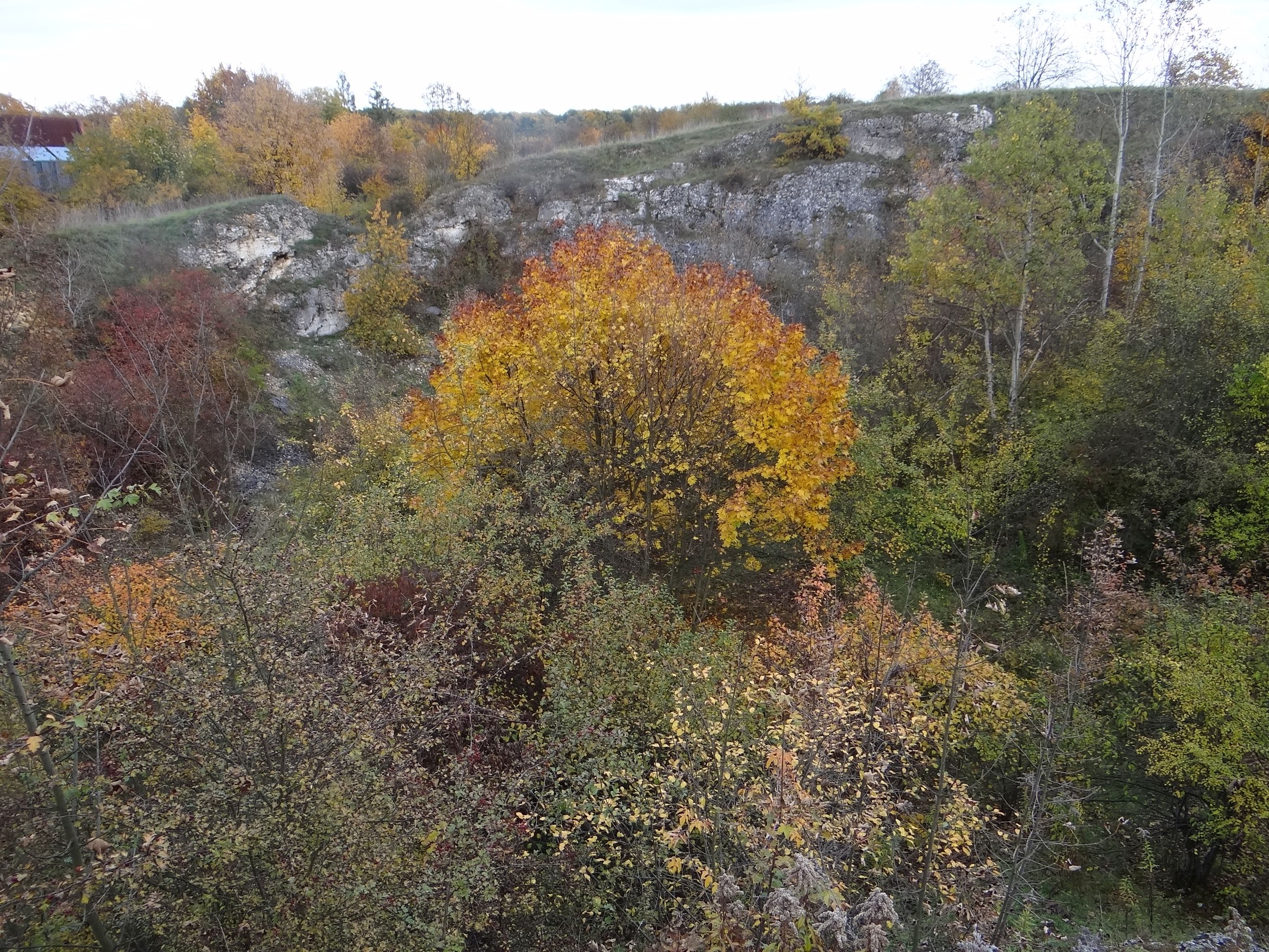 Łom Bergera na Księżej Górze w Pychowicach (Kraków)